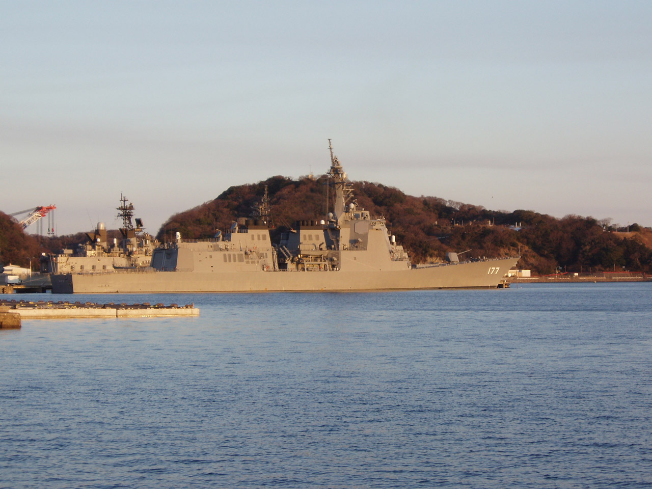 ミサイル護衛艦あたご 横須賀港にて